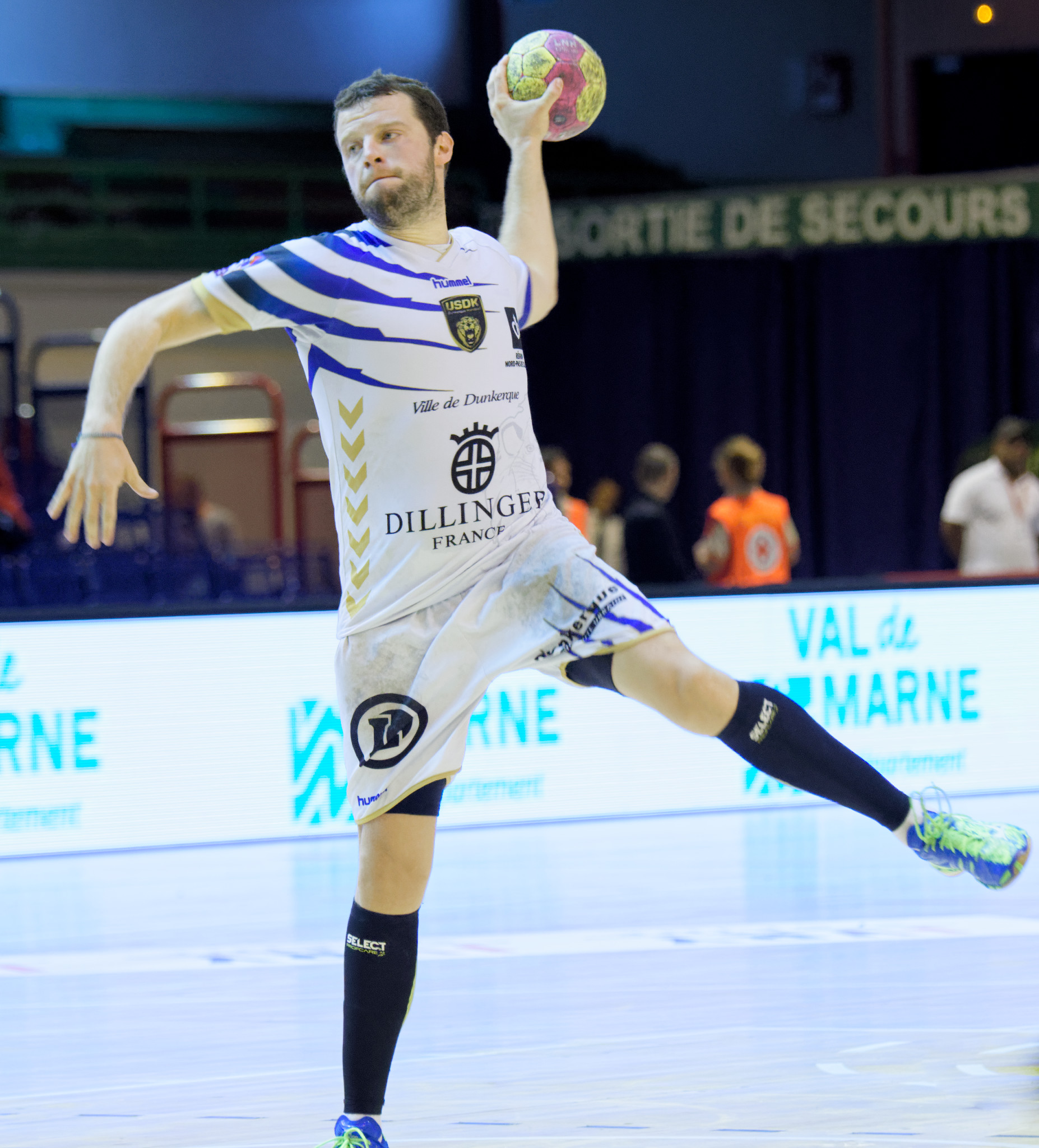 Rencontre du challenge Marrane 2016 entre l'US Dunkerque et les croates du RK Zagreb